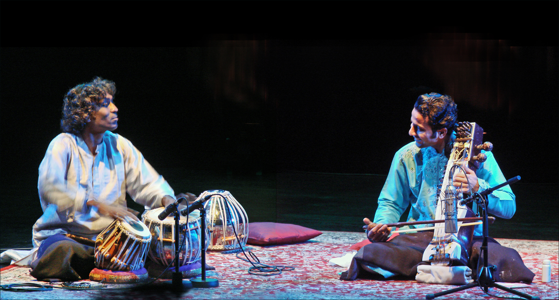 Sabir Khan (sarangi) et Prabhu Edouard (tabla) en concert au musée Guimet vendredi 27 janvier 2012 musique traditionnelle de l'Inde du nord Un concert exceptionnel avec deux instrumentistes virtuoses, réunis pourla première fois sur la scène de l'auditorium du musée Guimet, qui ont enthousiasmé les spectateurs par leur sensibilité et leur connivence artistique. Félicitations à Hubert Laot pour la qualité de sa programmation.